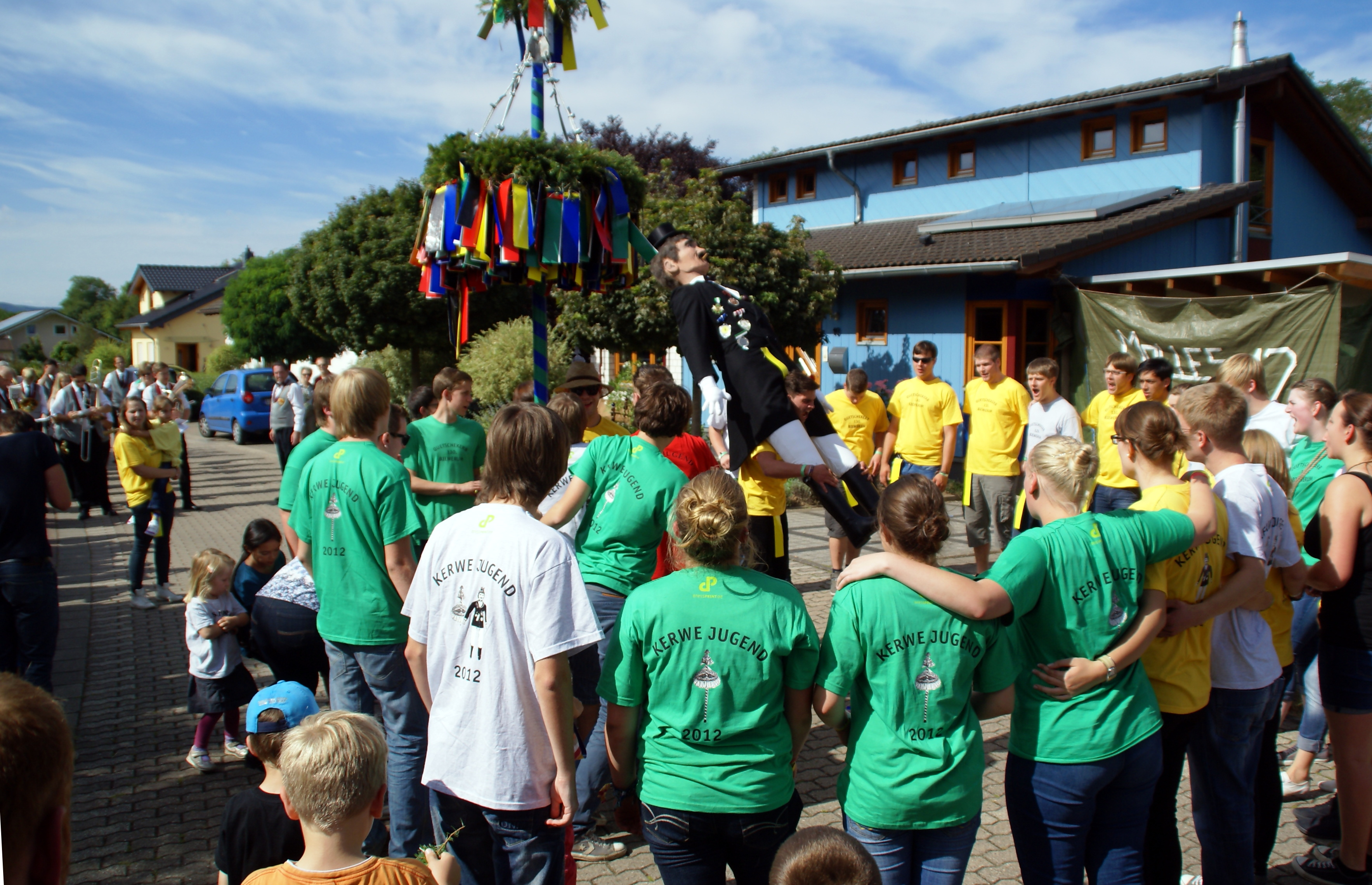 Umzug zur Quetschekerb 2012 in Biebernheim